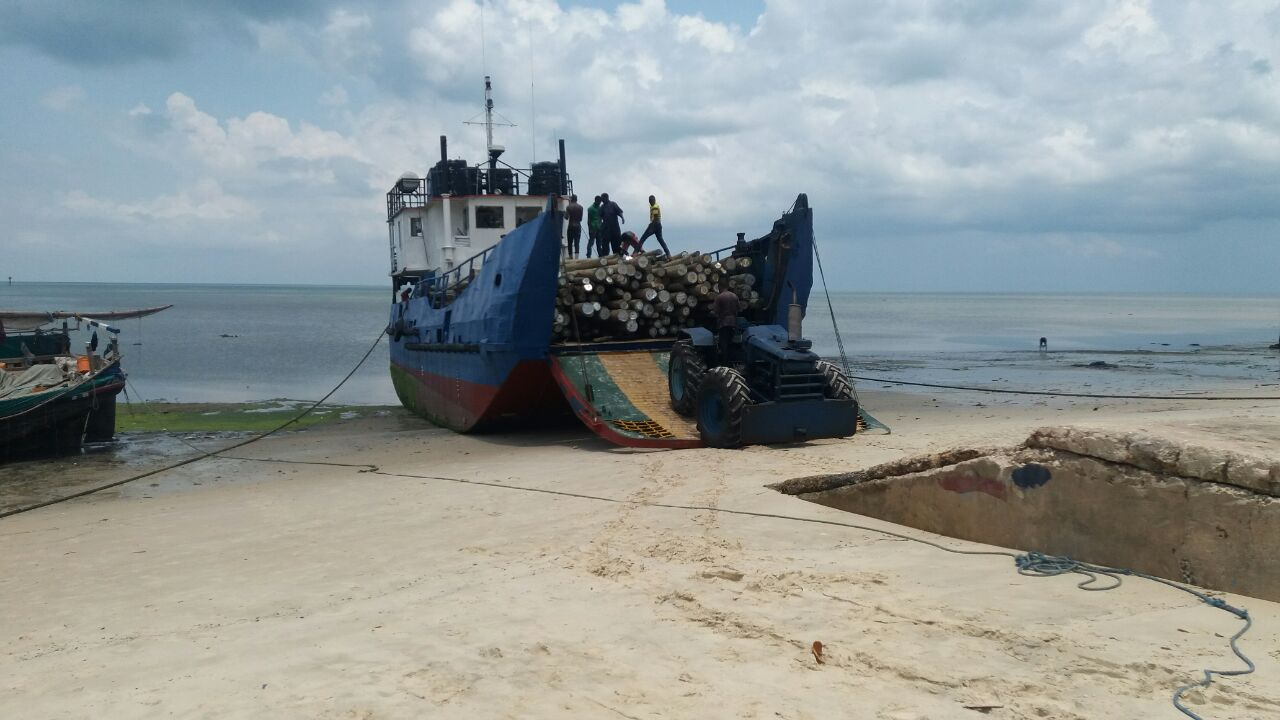 פירוק סחורה בחופי מאפיה